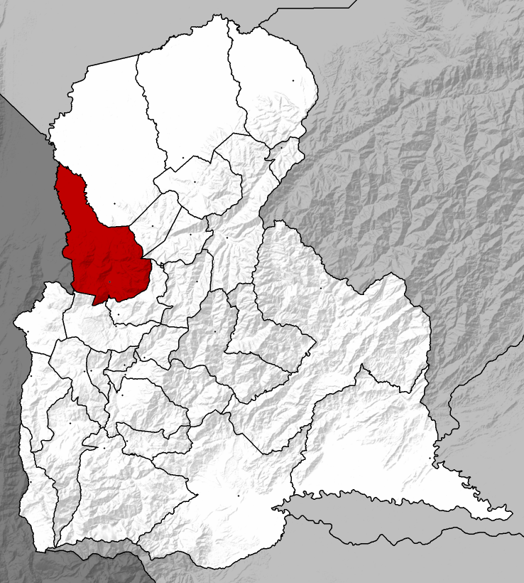 Mapa localizador con relieve del municipio Ayacucho del estado Táchira